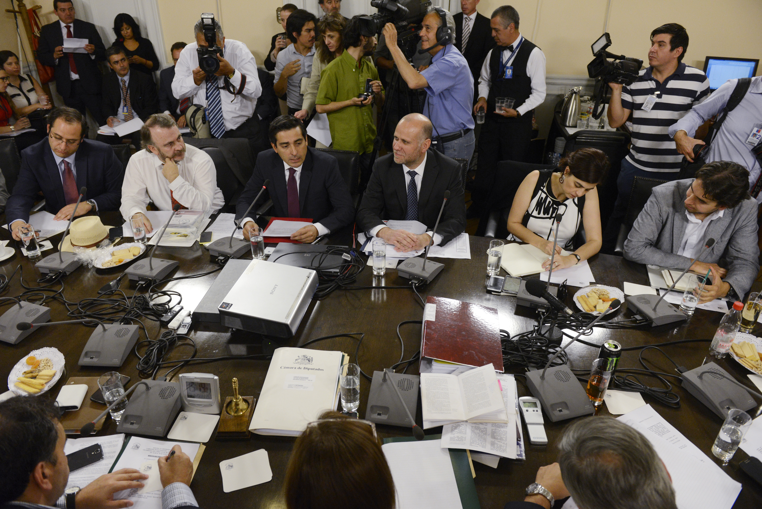 Ministro Álvaro Elizalde Asiste a Comisión Penta en el ex Congreso.